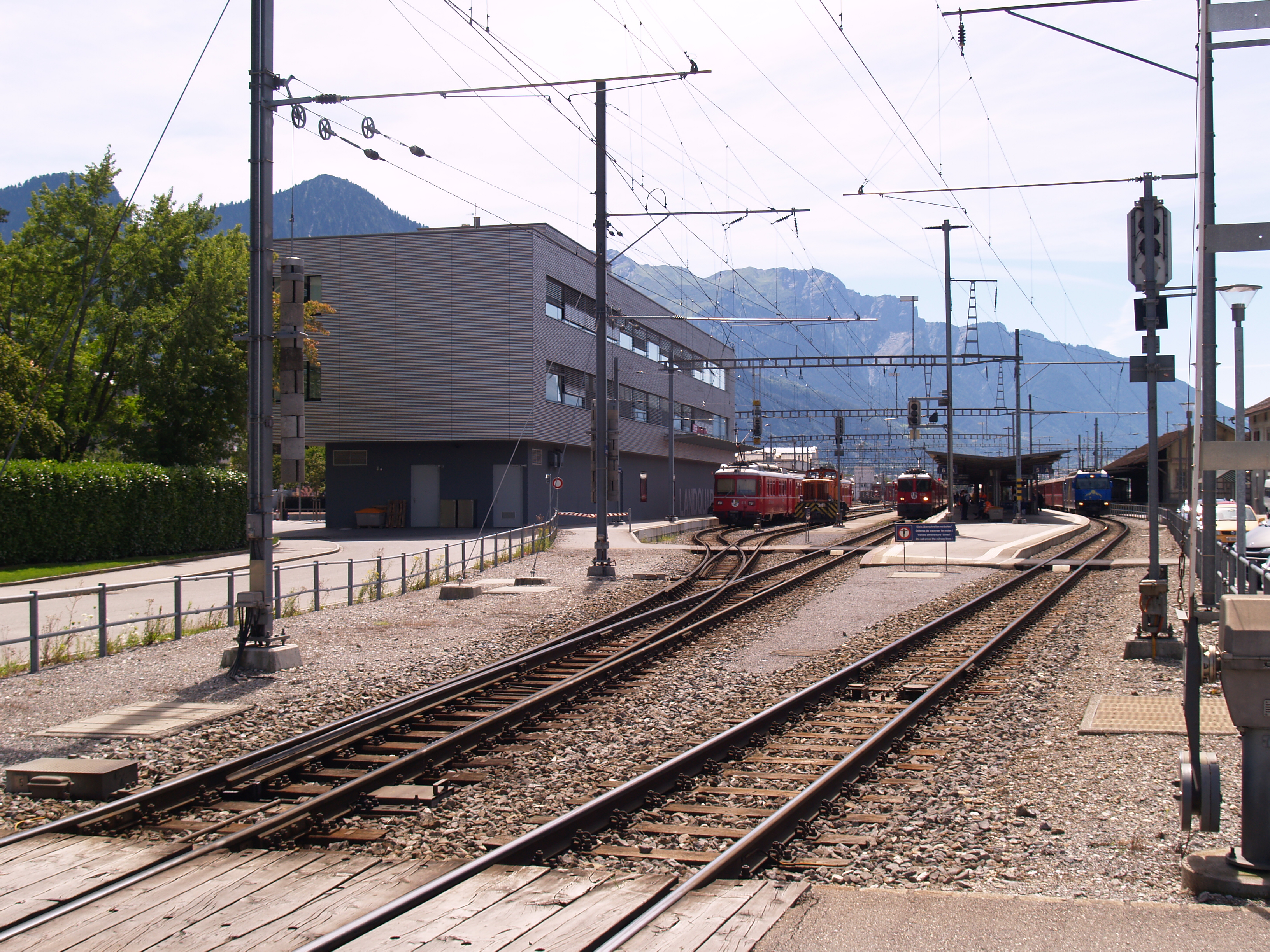 Die Gleis- und Publikumsanlage des RhB-Teils des Bahnhof Landquart (Sicht von Norden)